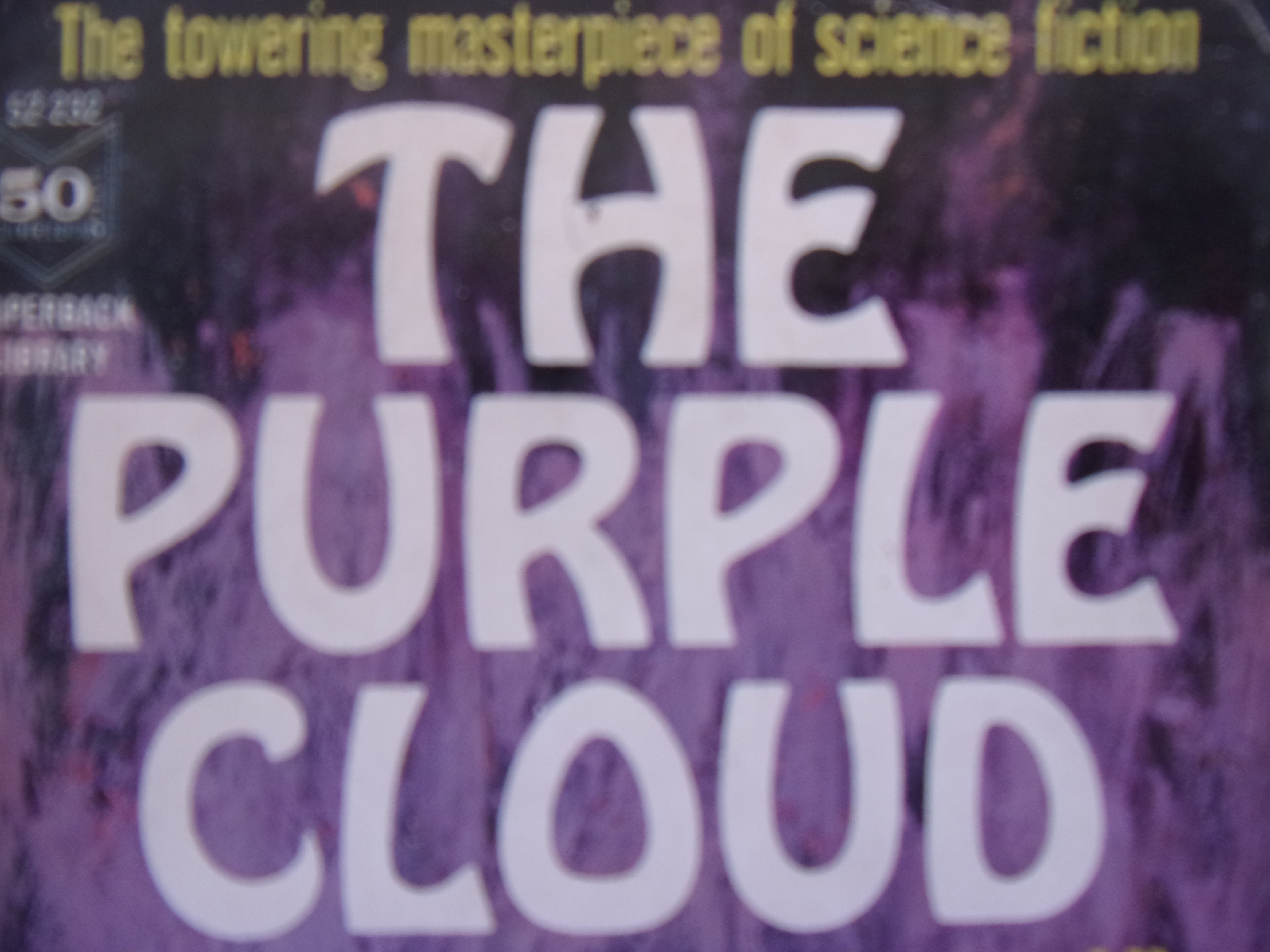 Page de garde de The Purple Cloud dans l'édition de poche parue aux USA. J'ai pris garde à ne pas faire apparaître de dessin, logo, pictogramme ou autre qui serait protégé par le droit d'auteur.